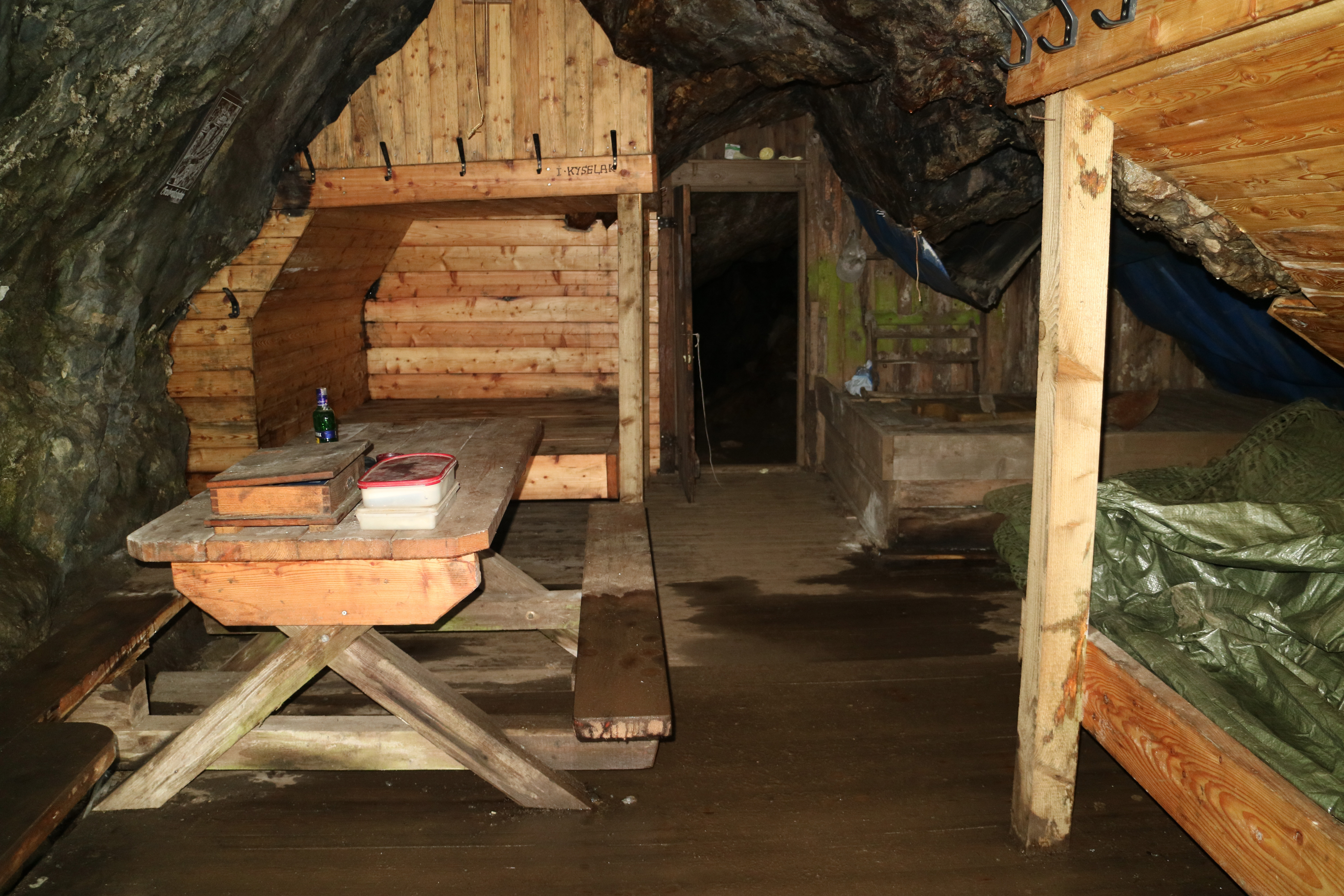 Knappenstube im Zinkwandstollen